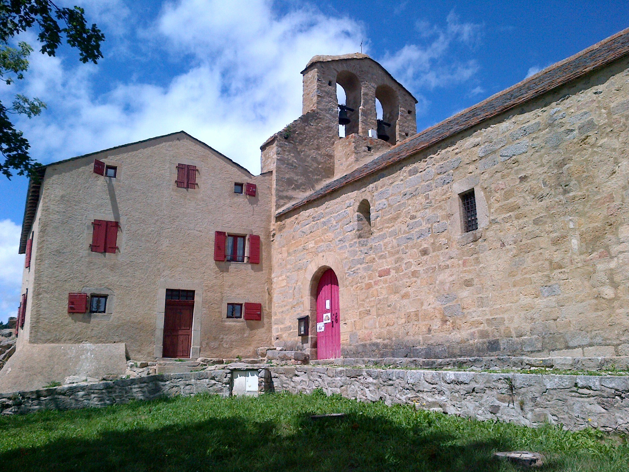 església romànica situada a La Llaguna, a la comarca del Capcir, a la Catalunya del Nord, departament francès dels Pirineus Orientals[